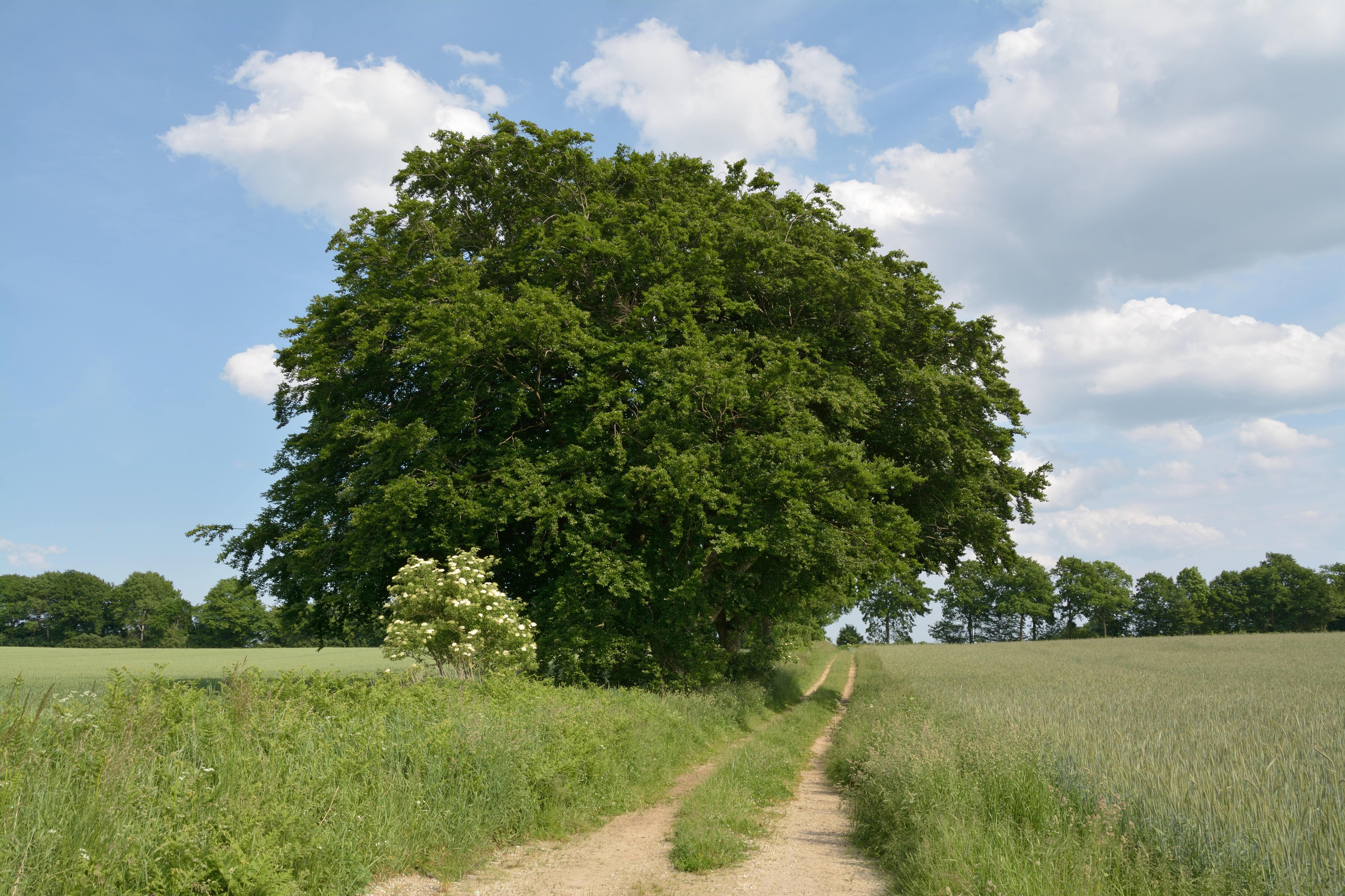 Naturdenkmal im Kreis Steinburg in Warringholz. Es ist die stärkste bekannte Buche im Kreisgebiet. Eine Rotbuche auf einem Knick ist das Naturdenkmal Nummer 32.